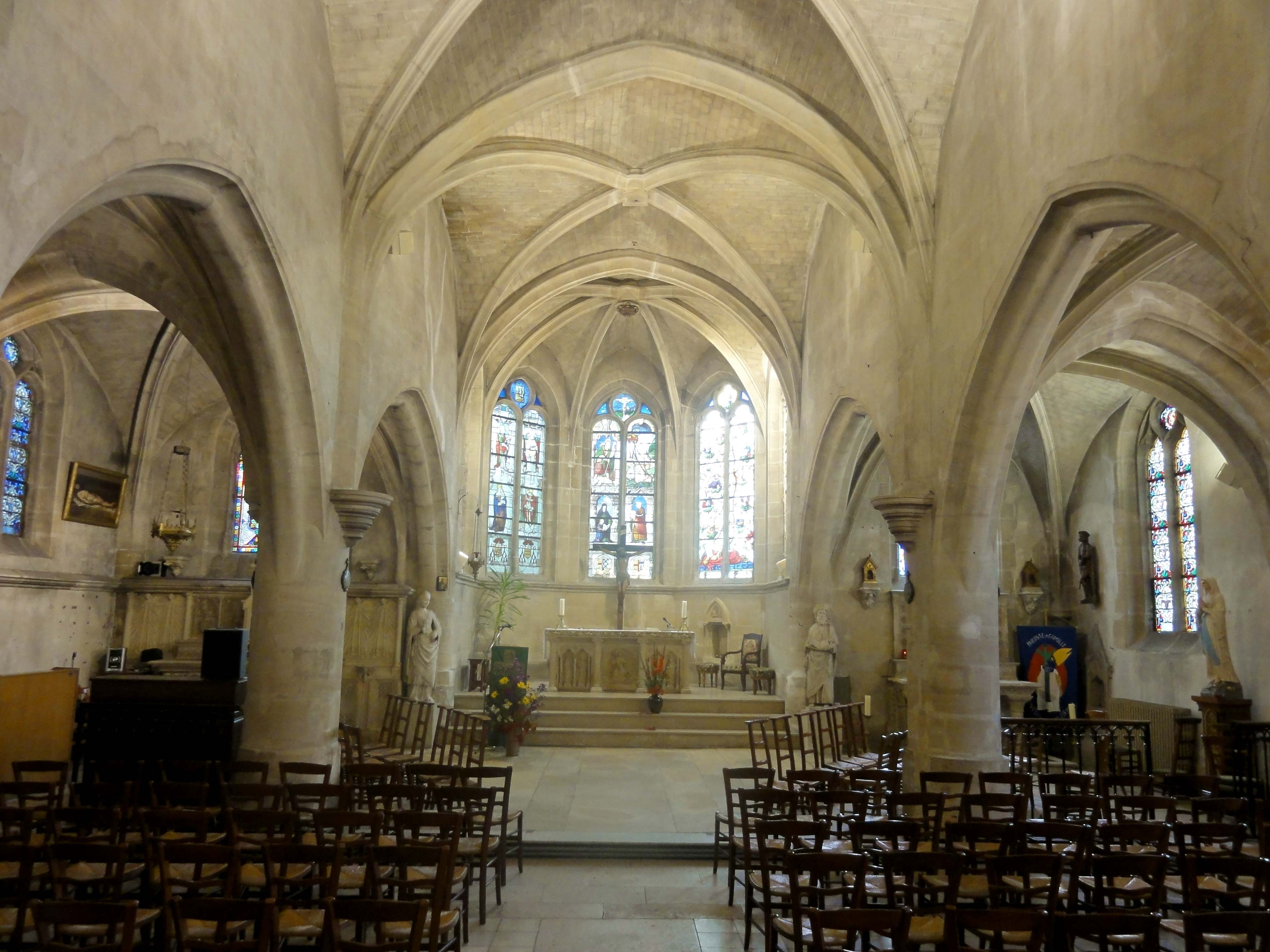 Intérieur de l'église - voir titre.